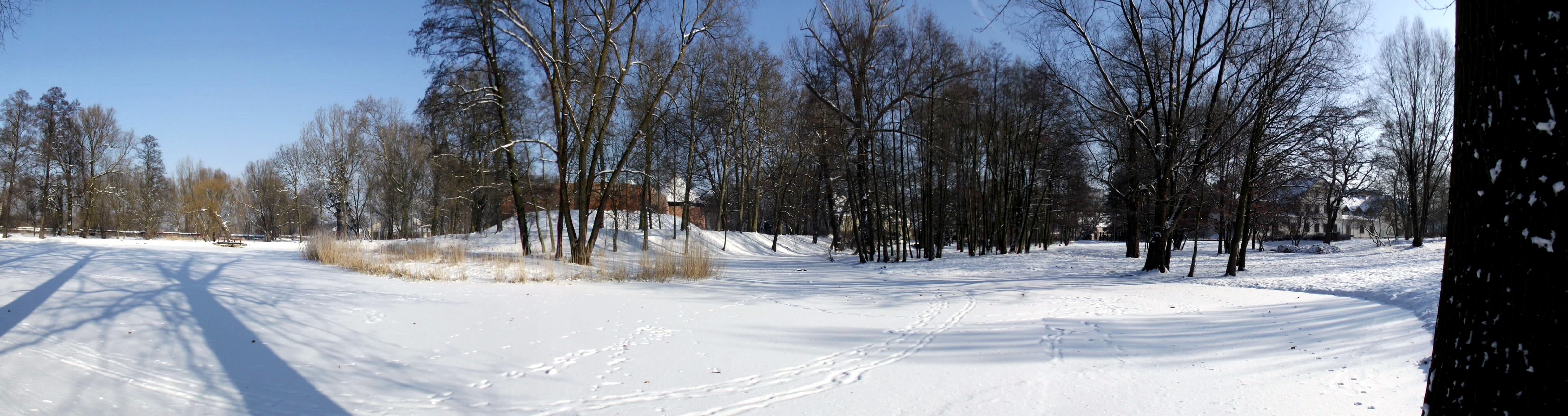 Park na wyspie zamkowej; od prawej: karczma, starostwo, zamek